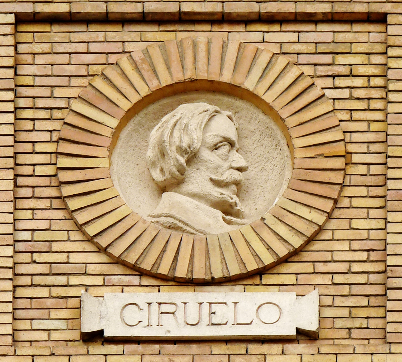 Zaragoza - Antigua Facultad de Medicina - Medallón - Pedro Ciruelo